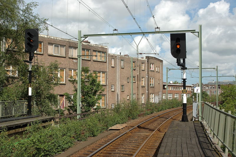 Voorseinen te Rotterdam Bergweg in de richting van Pijnacker.